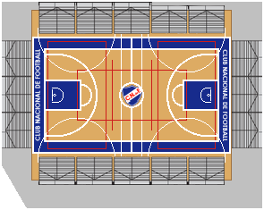 Imagen que representa el Polideportivo de Nacional, presente dentro del predio del estadio Gran Parque Central.